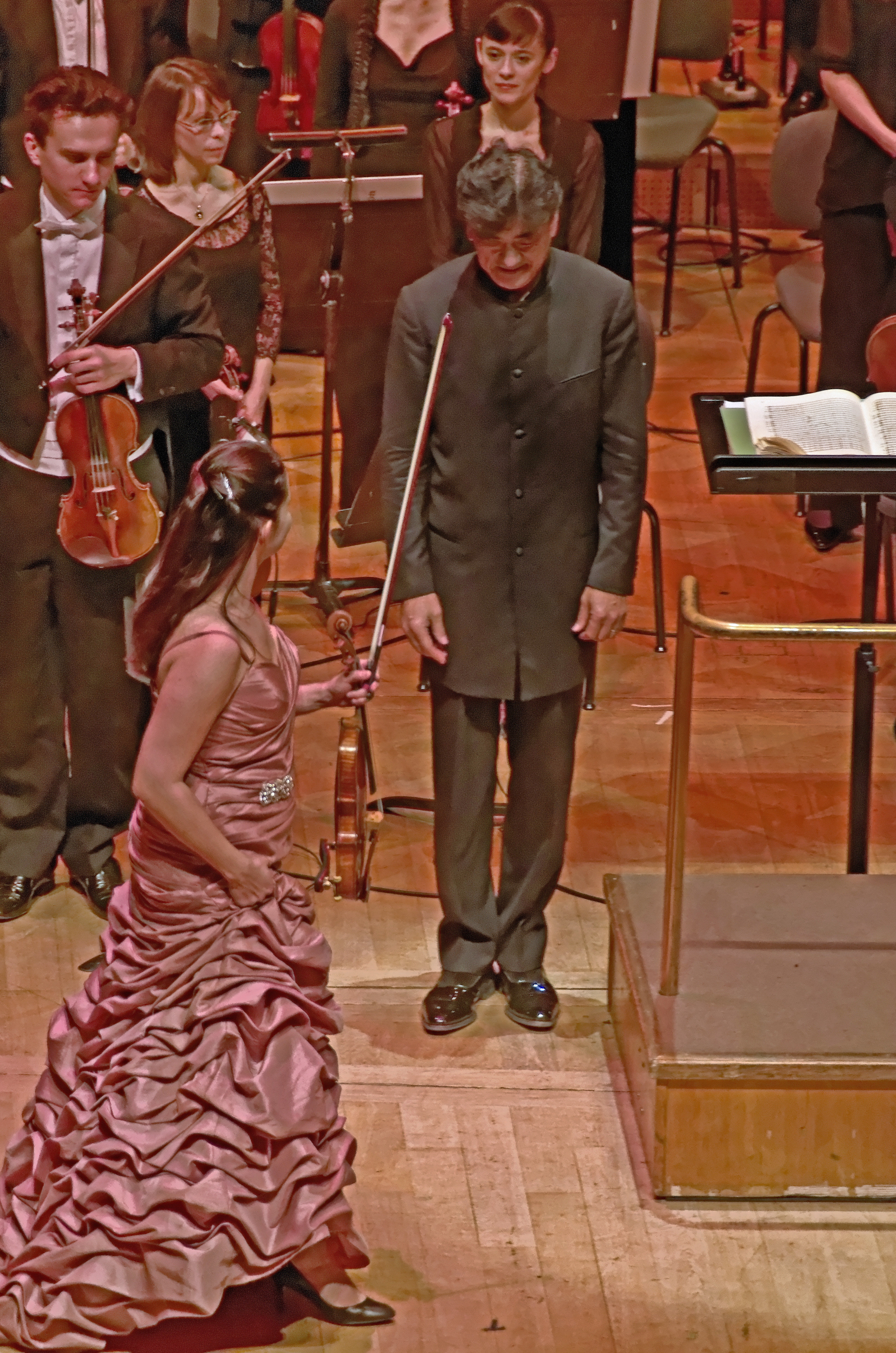 Le chef d'orchestre Yutaka Sado saluant la violoniste lettone Baiba Skride lors du concert de Nouvel An. Auditorium de Lyon La Part Dieu, France